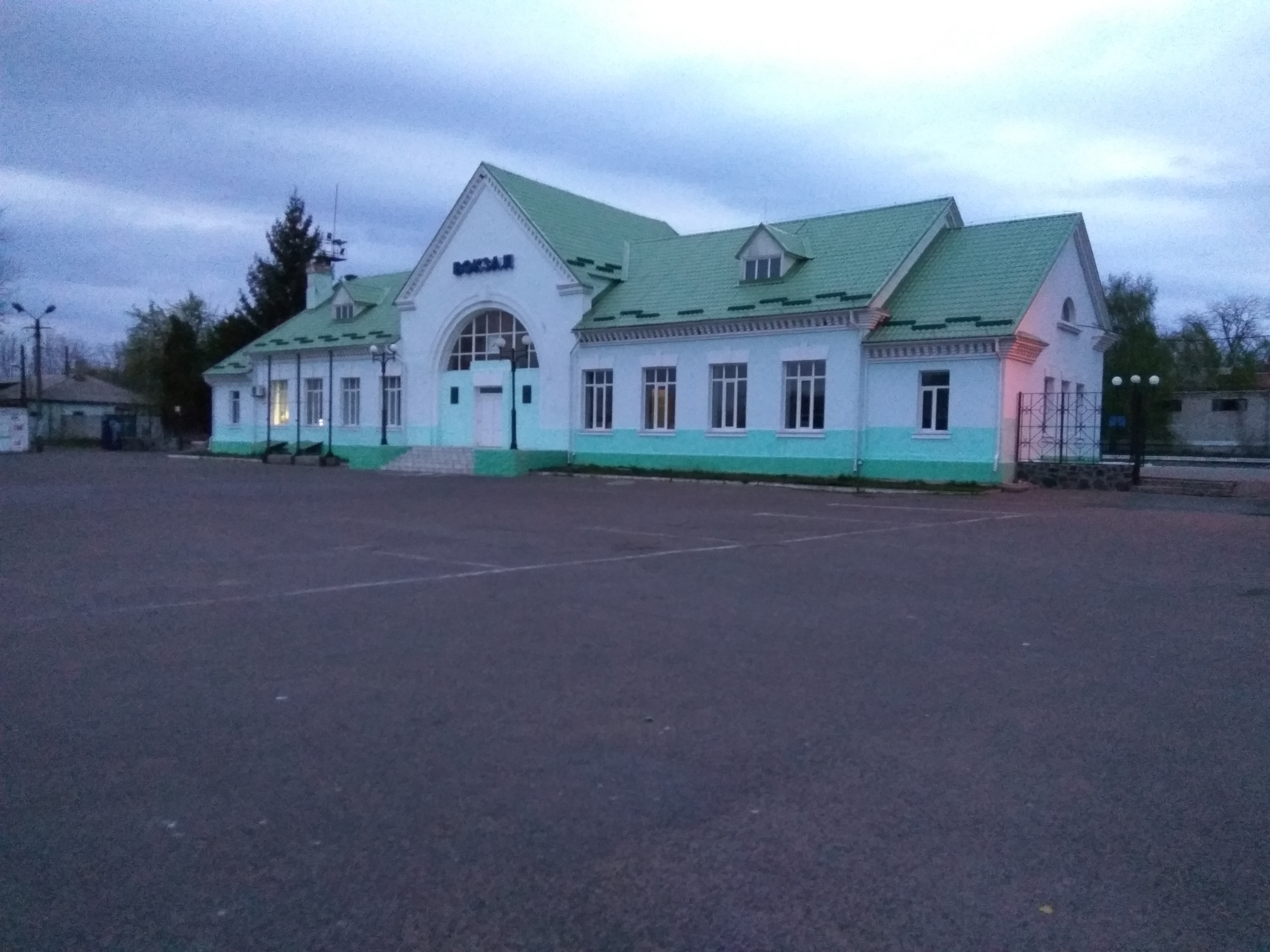 Станція Гайворон